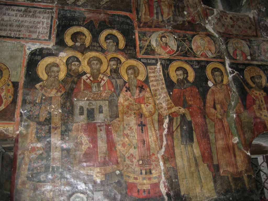 Св. Седмочисленици и св. Йоан Кукузел. Стенопис от 1744 г. от главния храм на манастира в Арденица (днешна Албания), изграден върху основите на черквата "Св. Троица", строена с ктиторството на св. цар Борис Покръстител. Изписан от братята Константин и Анастас Зограф от Корча.